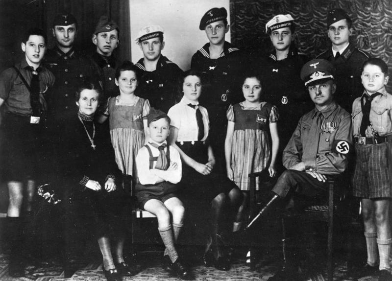 Familie mit 12 Kindern Zentralbild, 13.8.1943, II. Weltkrieg 1939-45 Unser Bild zeigt den politischen NS-Leiter Reichel (aus Erdmannsdorf in Sachsen) mit seiner Frau und seinen zwölf Kindern. Die Mutter trägt das "Mutterkreuz". Fünf Söhne sind bei der deutschen Wehrmacht; der sechste ist beim Reichs-Arbeitsdienst. Die kleineren Kinder sind alle Mitglieder in NS-Jugendorganisationen. [Scherl Bilderdienst] Additional information 2012: The youngest girls have Wolfsangels on their dresses; symbols of the Deutsche Kinderschar (run by local NS-Frauenschaft groups for children 6-10). The older sister wears the uniform of the Bund Deutscher Mädel (BDM)